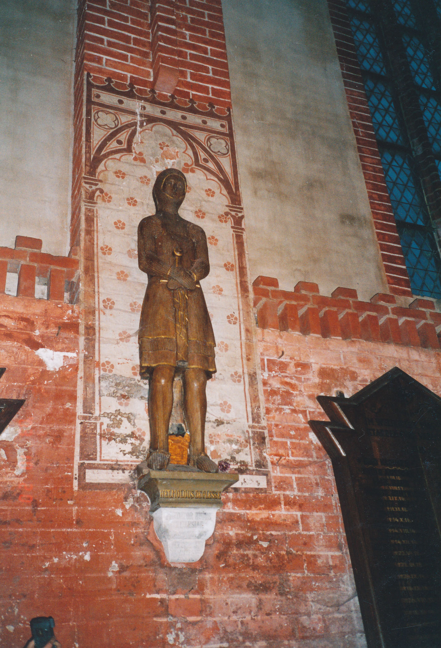 Kreuzritter Helmold III. von Plesse - mit zerstörtem Langschwert - in der partiell unrenovierten Kirche von Hohen Viecheln, die er selbst - oder sein Plesse-Vorfahre (Helmold von Plesse) - im 12. oder 13. Jh. erbauen ließ Datum: 20.10.2003 Urheber: Michael Pfeiffer alias Benutzer:Gordito1869 Quelle: privates Fotoarchiv des Urhebers